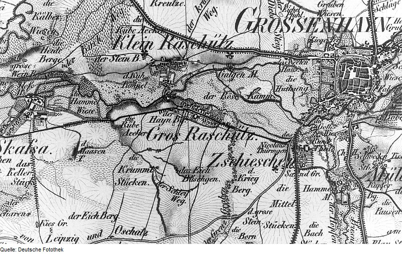 Original image description from the Deutsche Fotothek Großenhain-Großraschütz. Oberreit, Sect. Großenhain, 1841/43